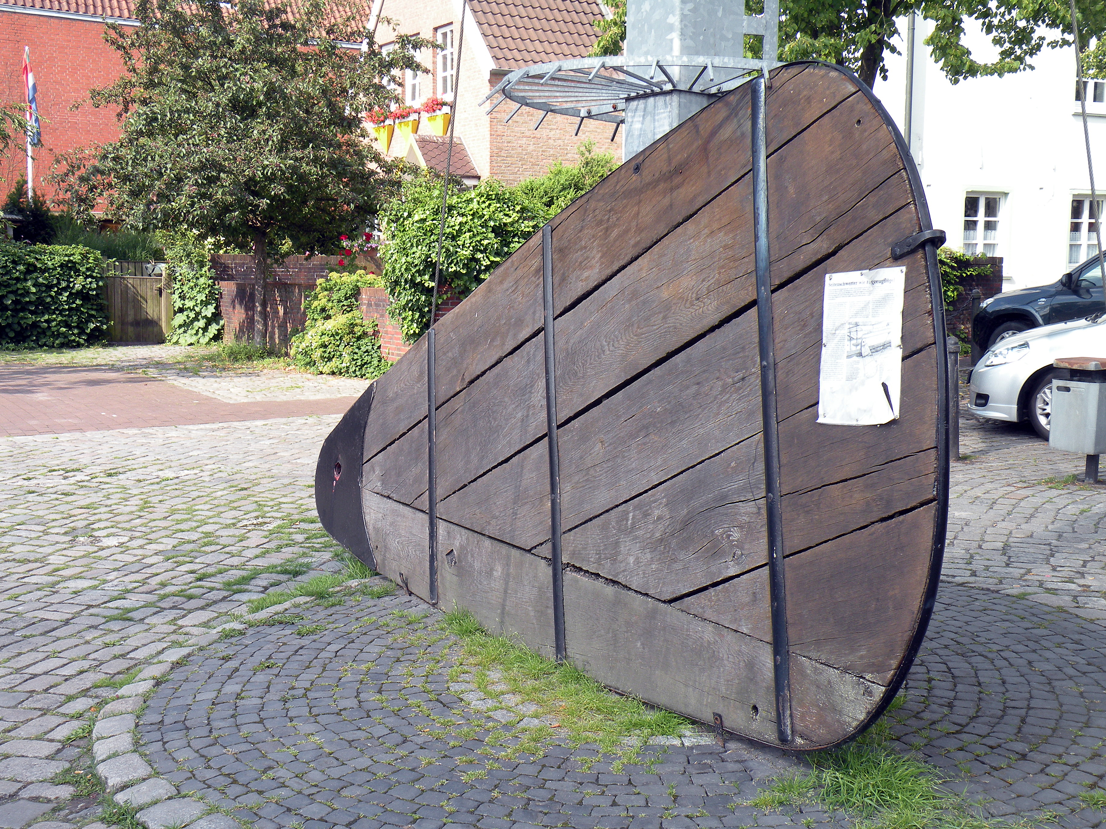 Leeboard. Leer. Museen exibition.